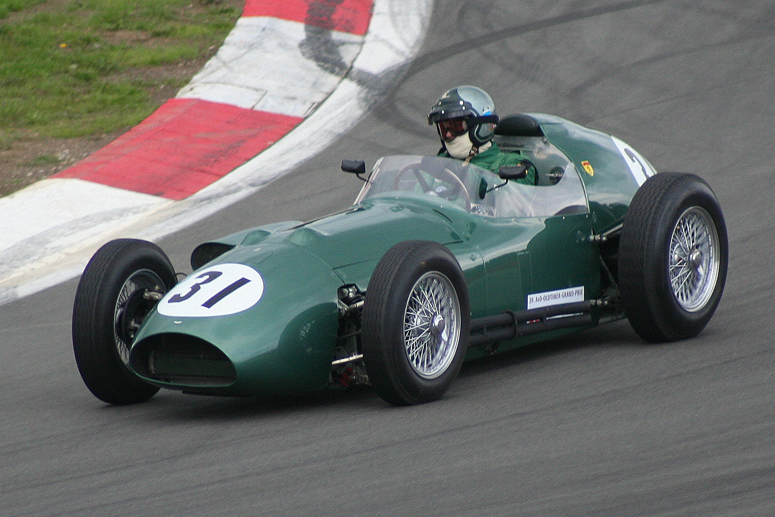 Aston Martin DBR4 beim AvD-Oldtimer-Grand-Prix auf dem Nürburgring